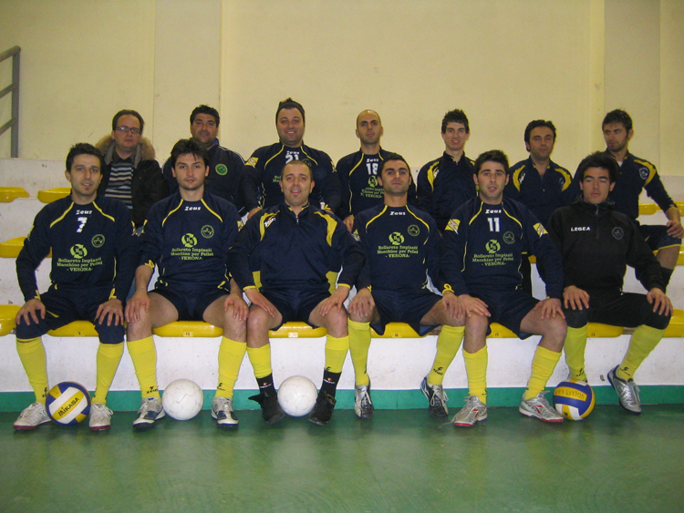 San Giovanni in Fiore - Calcio a 5 - Oratorio San Francesco